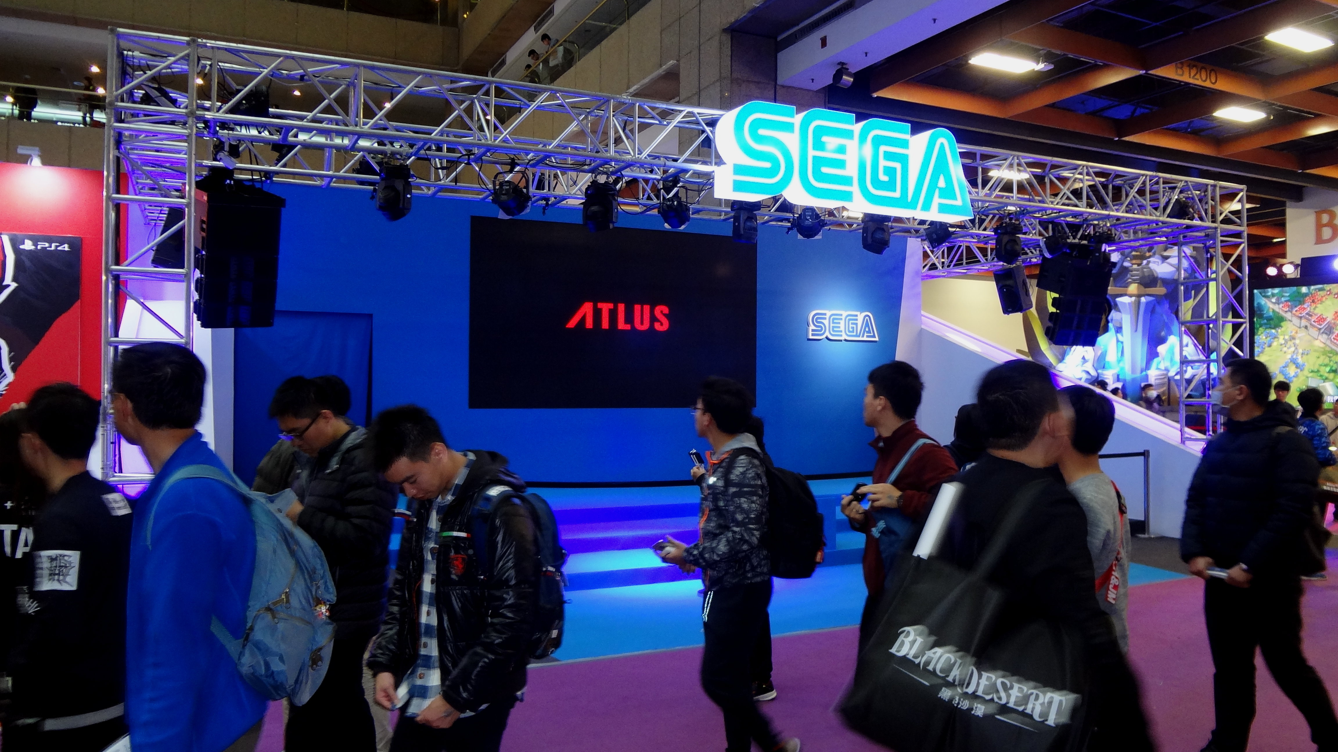 2017臺北國際電玩展，世嘉攤位播放Atlus遊戲軟體宣傳片。